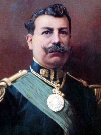 Ex presidente ismael montes